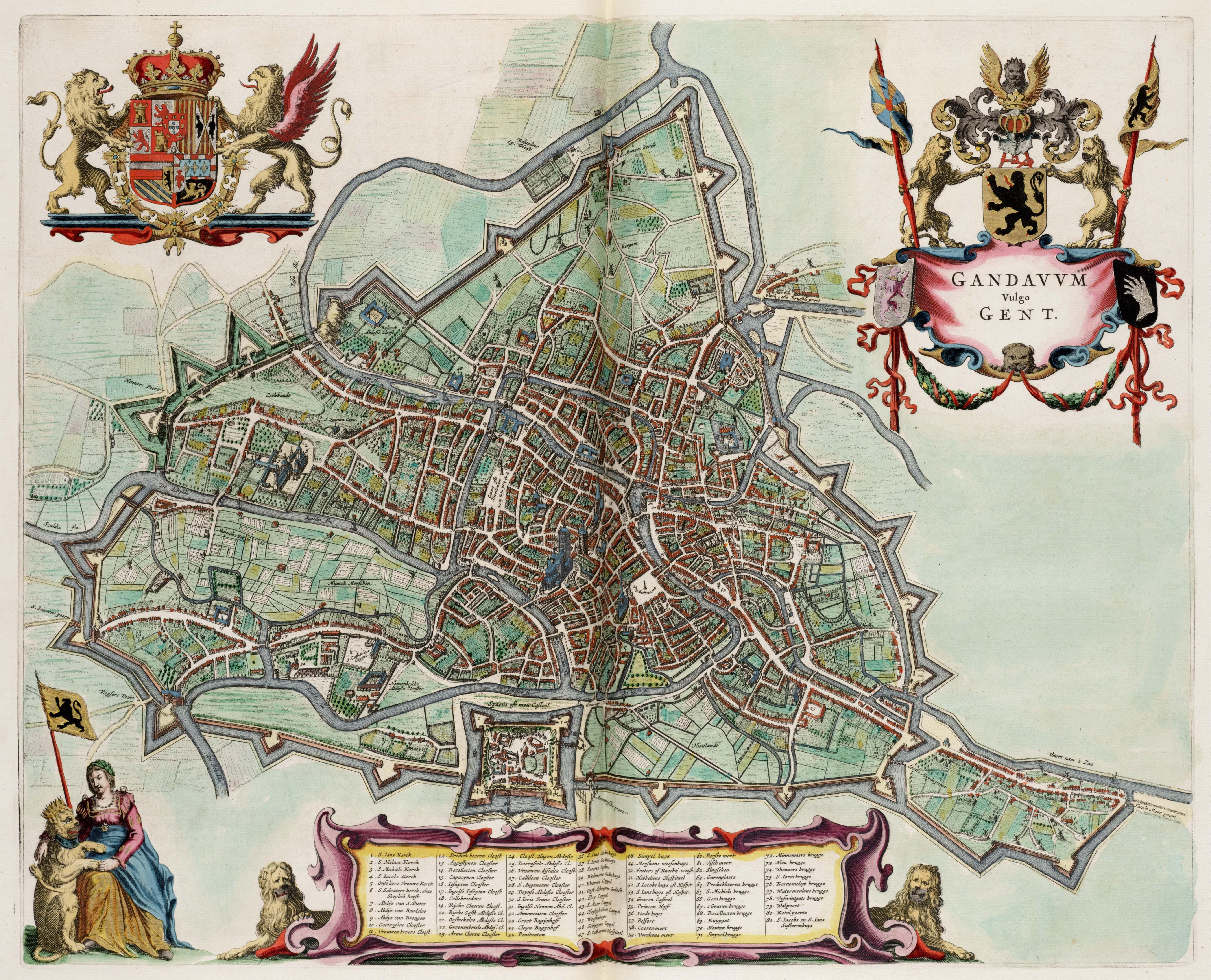 Kaart van Gent, België ; uit Atlas van Loon